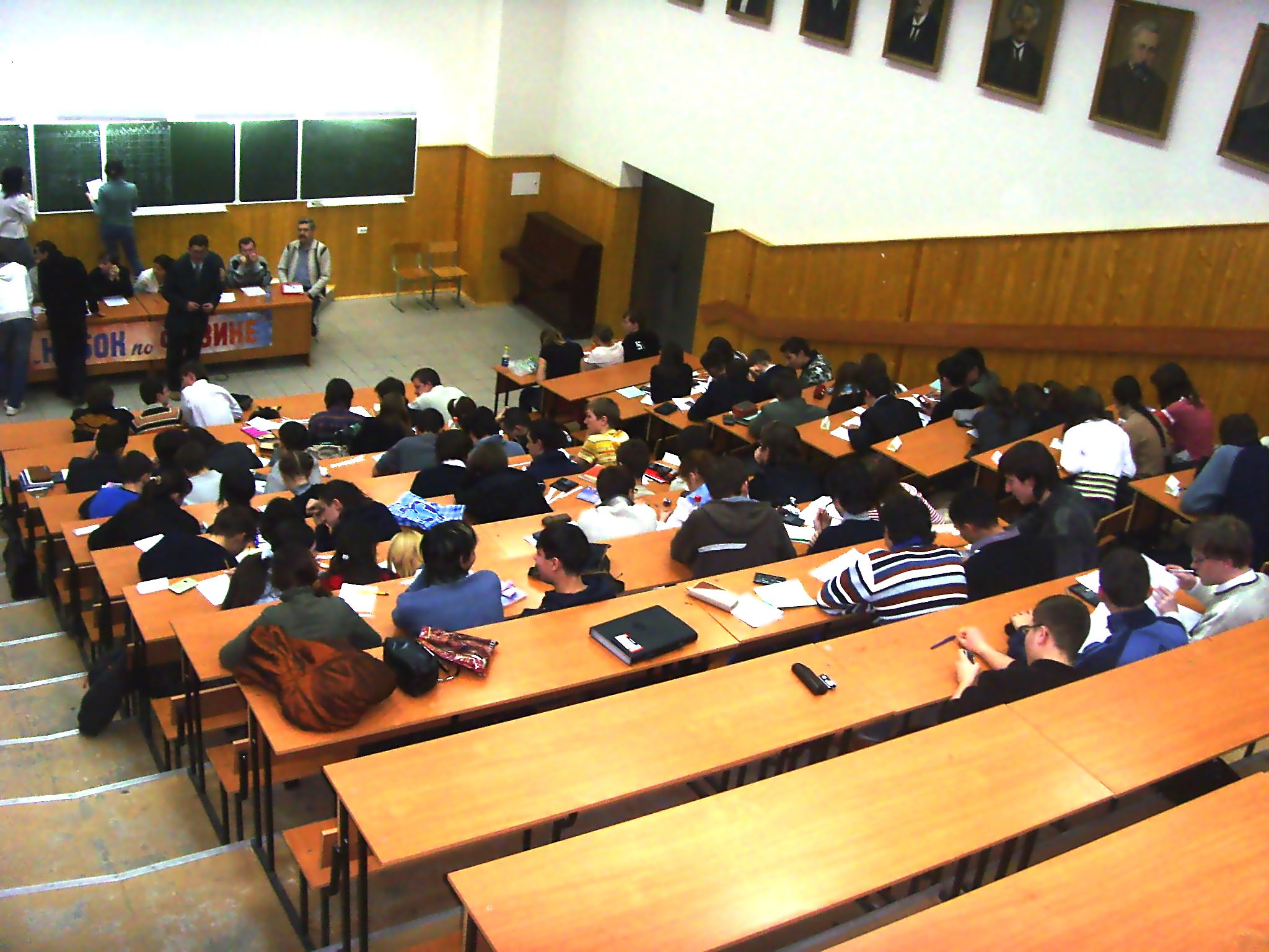 Кубок по физике среди школьников, 2008 год